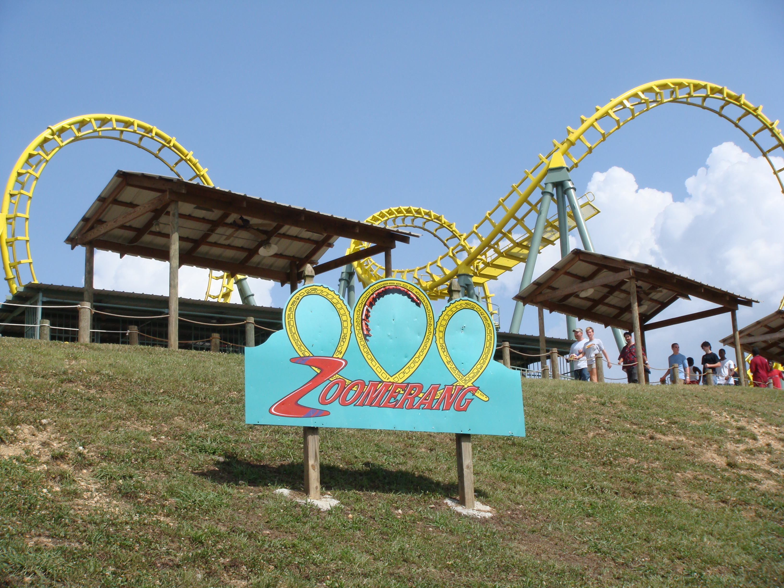 Alabama July 4 2008 417